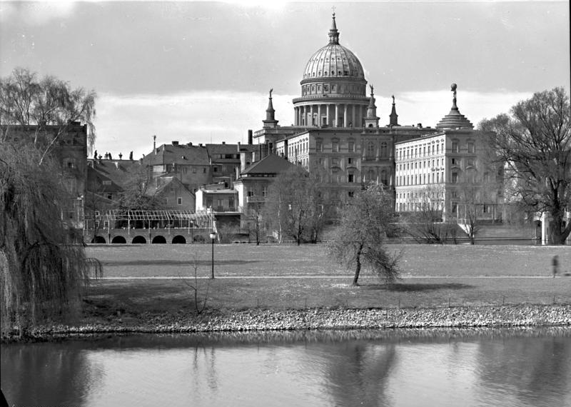 Potsdam.- Nikolaikirche und Palast Barberini